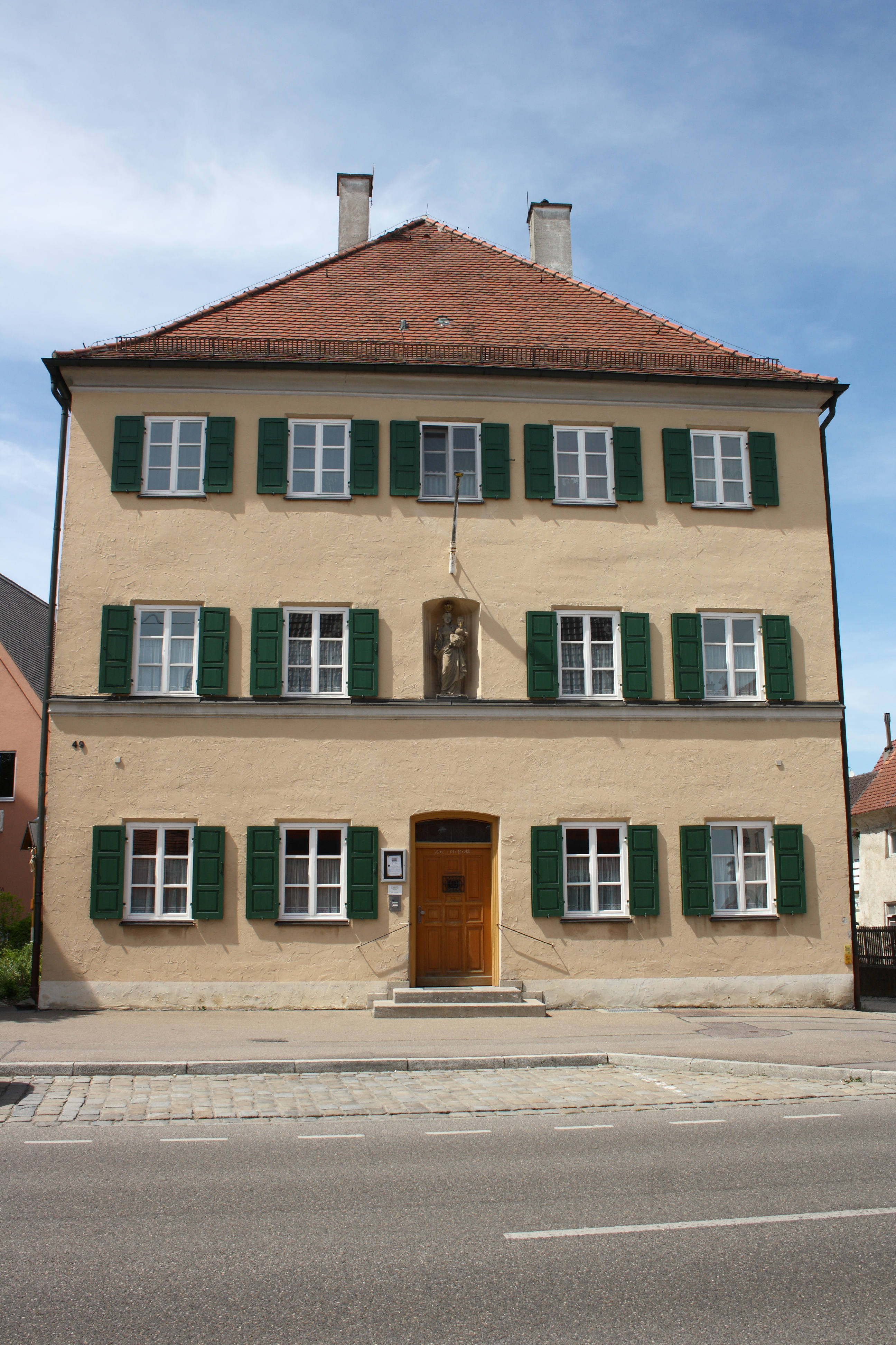 katholisches Pfarrhaus in Lauingen im Landkreis Dillingen an der Donau (Bayern), Herzog-Georg-Straße 49